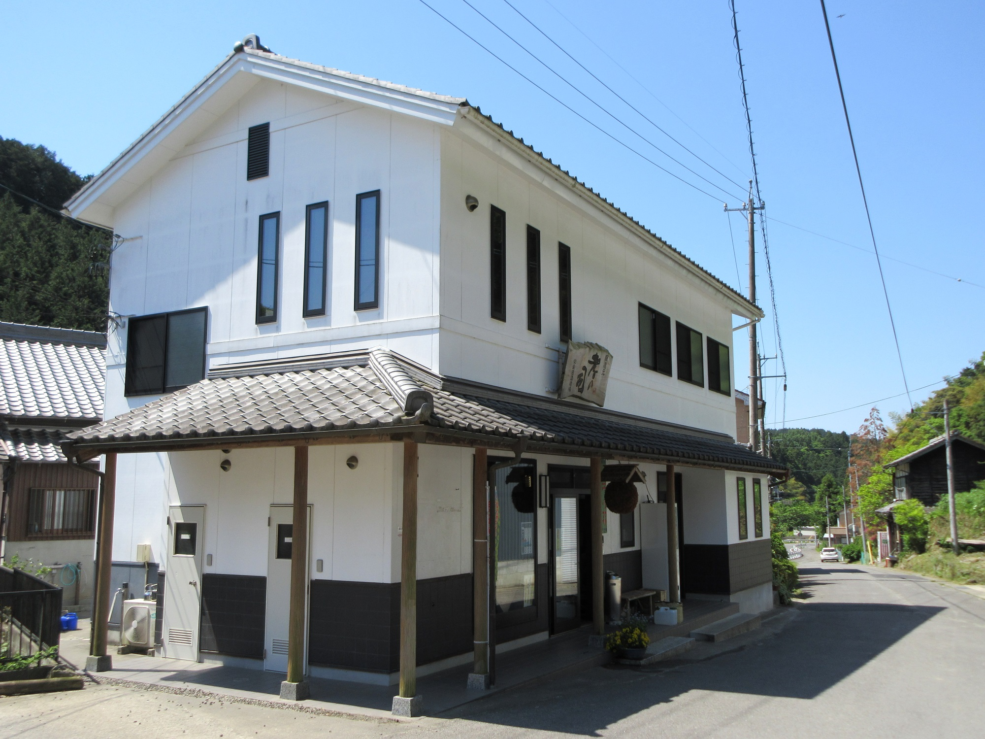 柴田酒造場（岡崎市保久町）